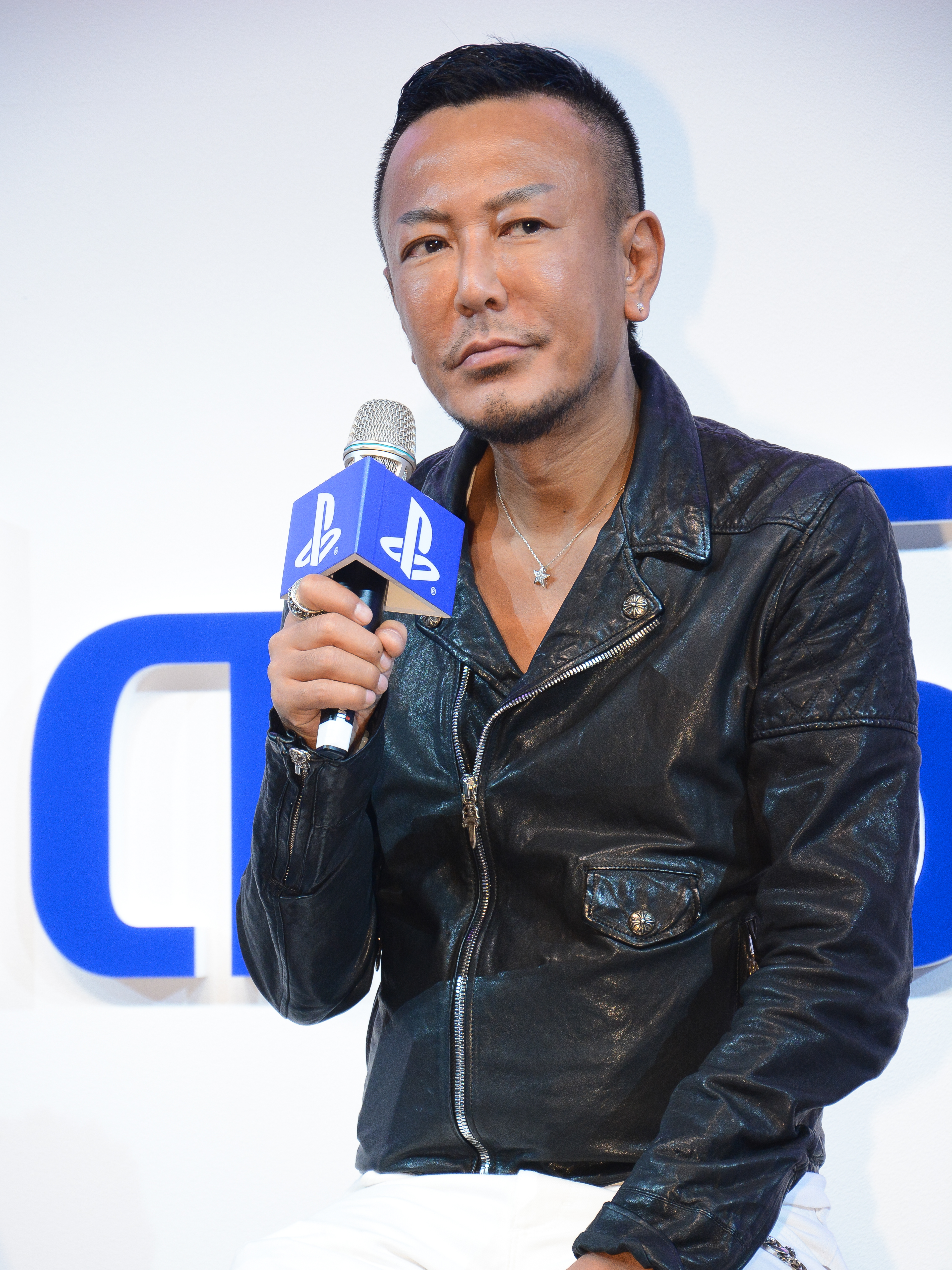 《人中之龍》系列總製作人名越稔洋。